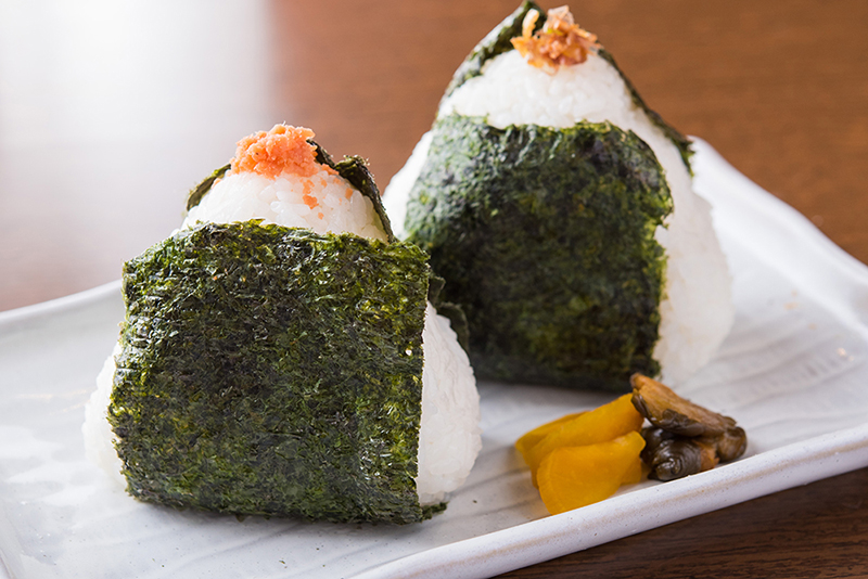 おにぎりを握ってくれる、握りスタッフを希望できる